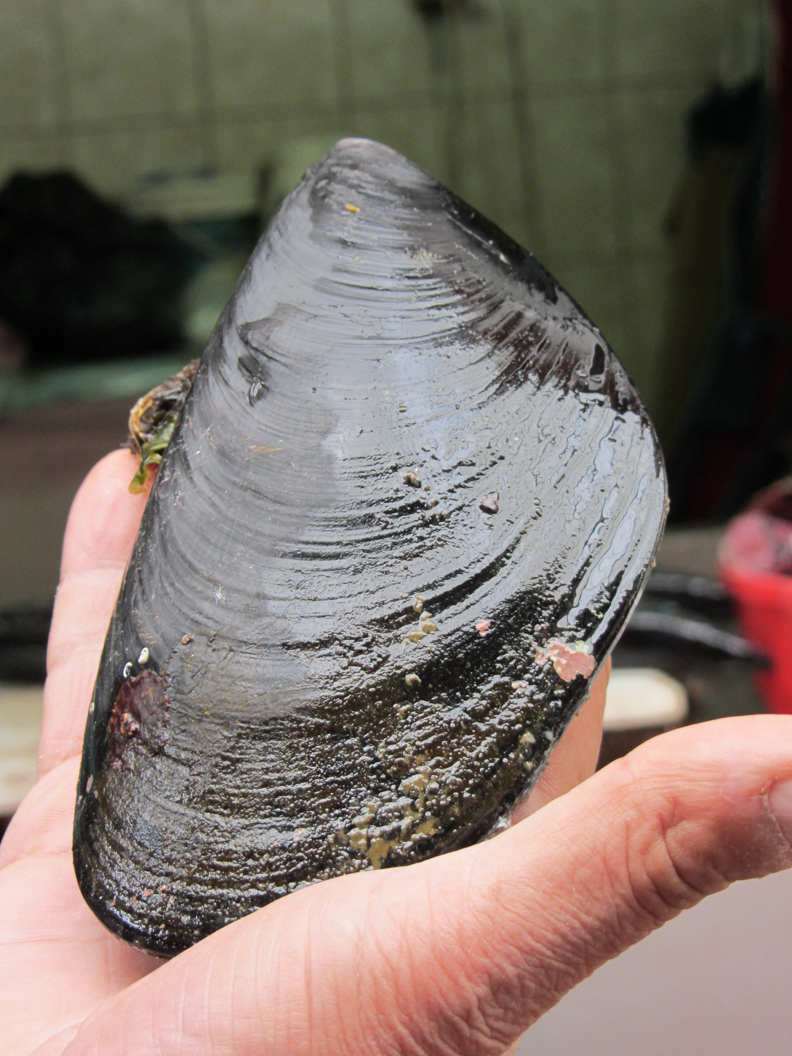 Choro zapato (llamado también choro maltón, Choromytilus chorus) en el mercado de Puerto Montt, Chile